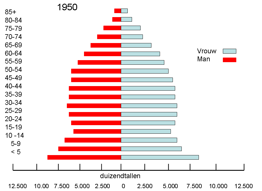 population USA 1950